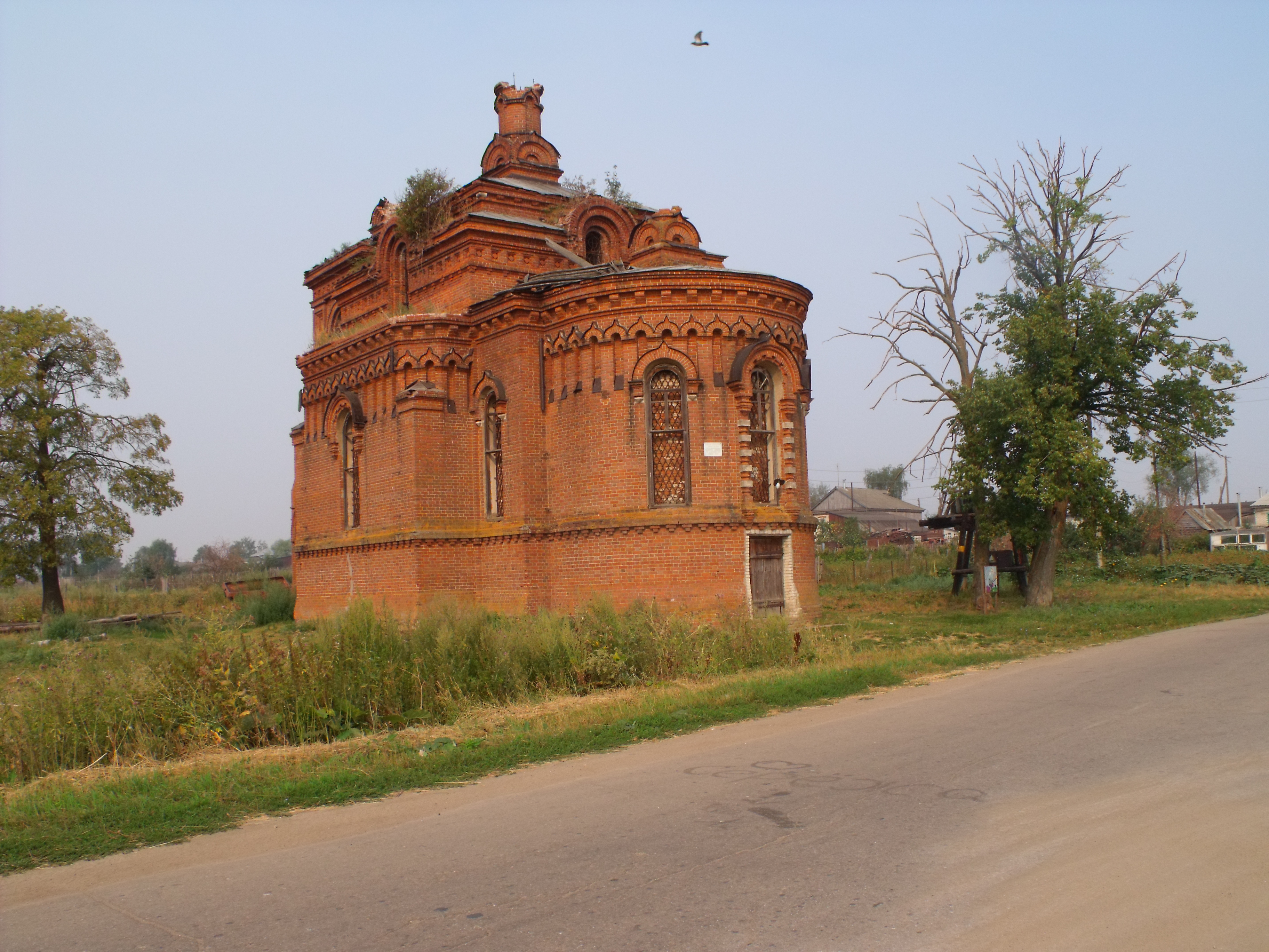 церковь: Новый Усад, Спасский район, Нижегородская область